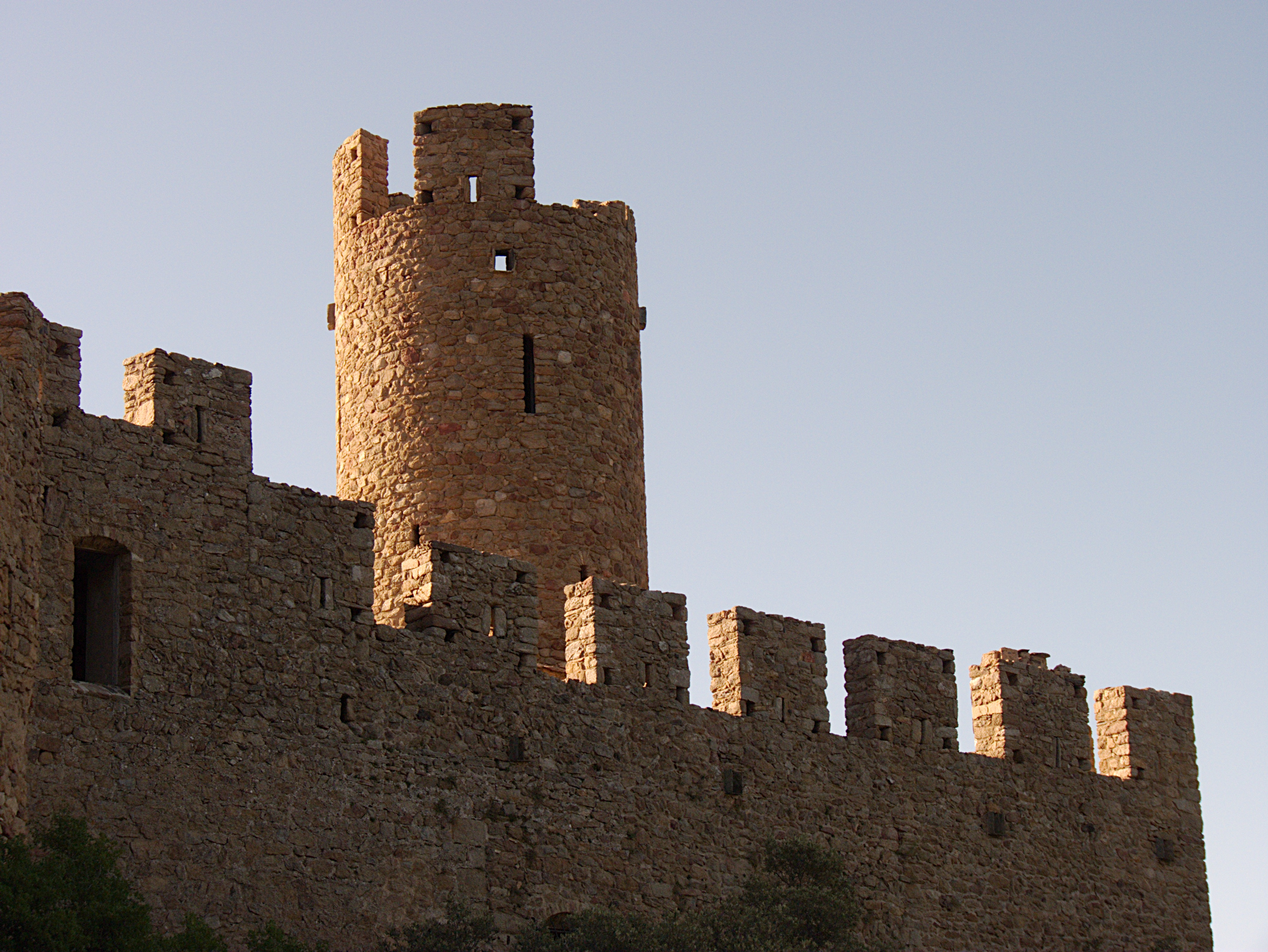 Tour principale du château de Requesens, La Jonquera (Haut-Ampurdan, Gérone, Catalogne, Espagne)